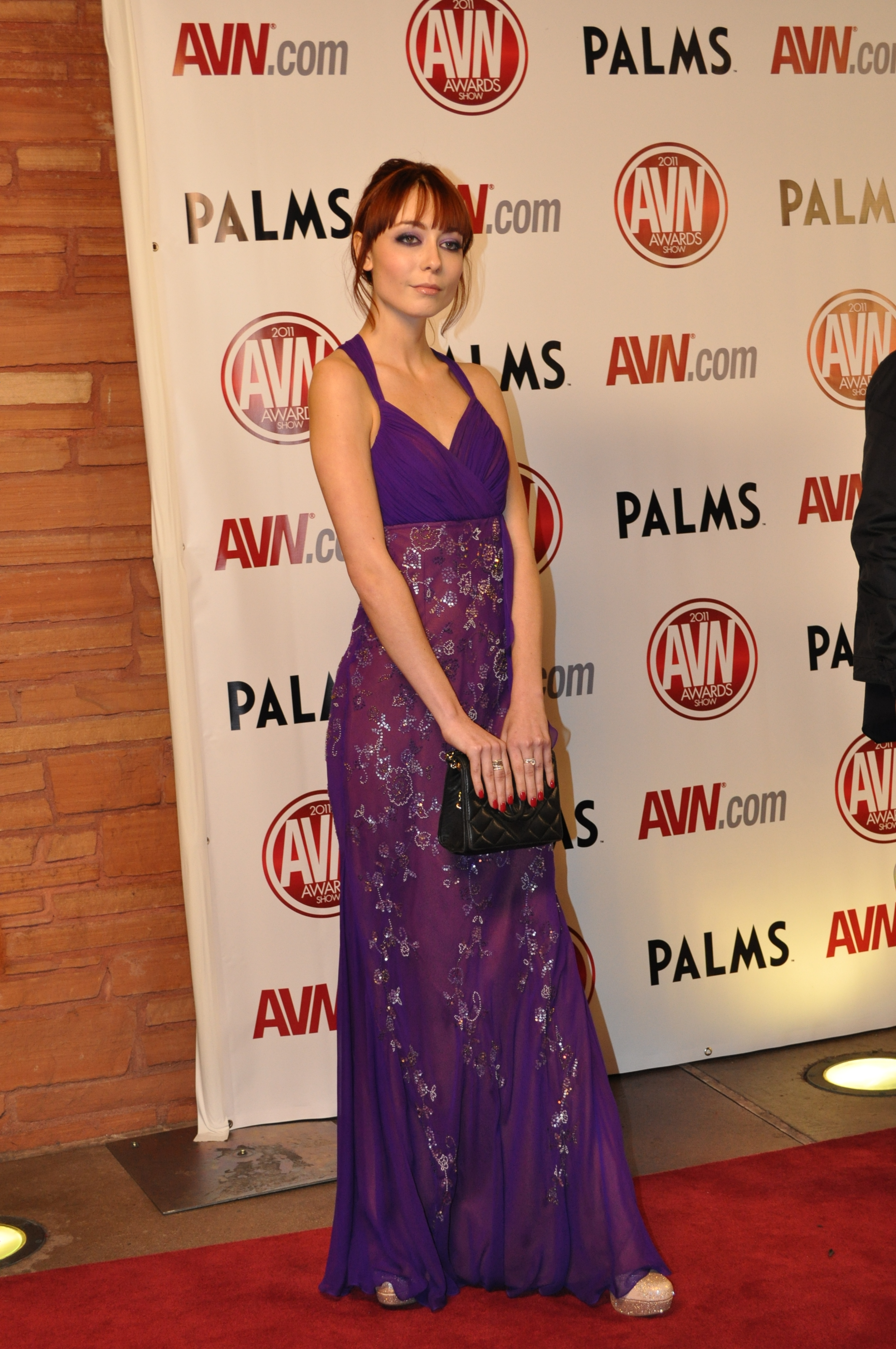 Zoe Voss at AVN Awards 2011